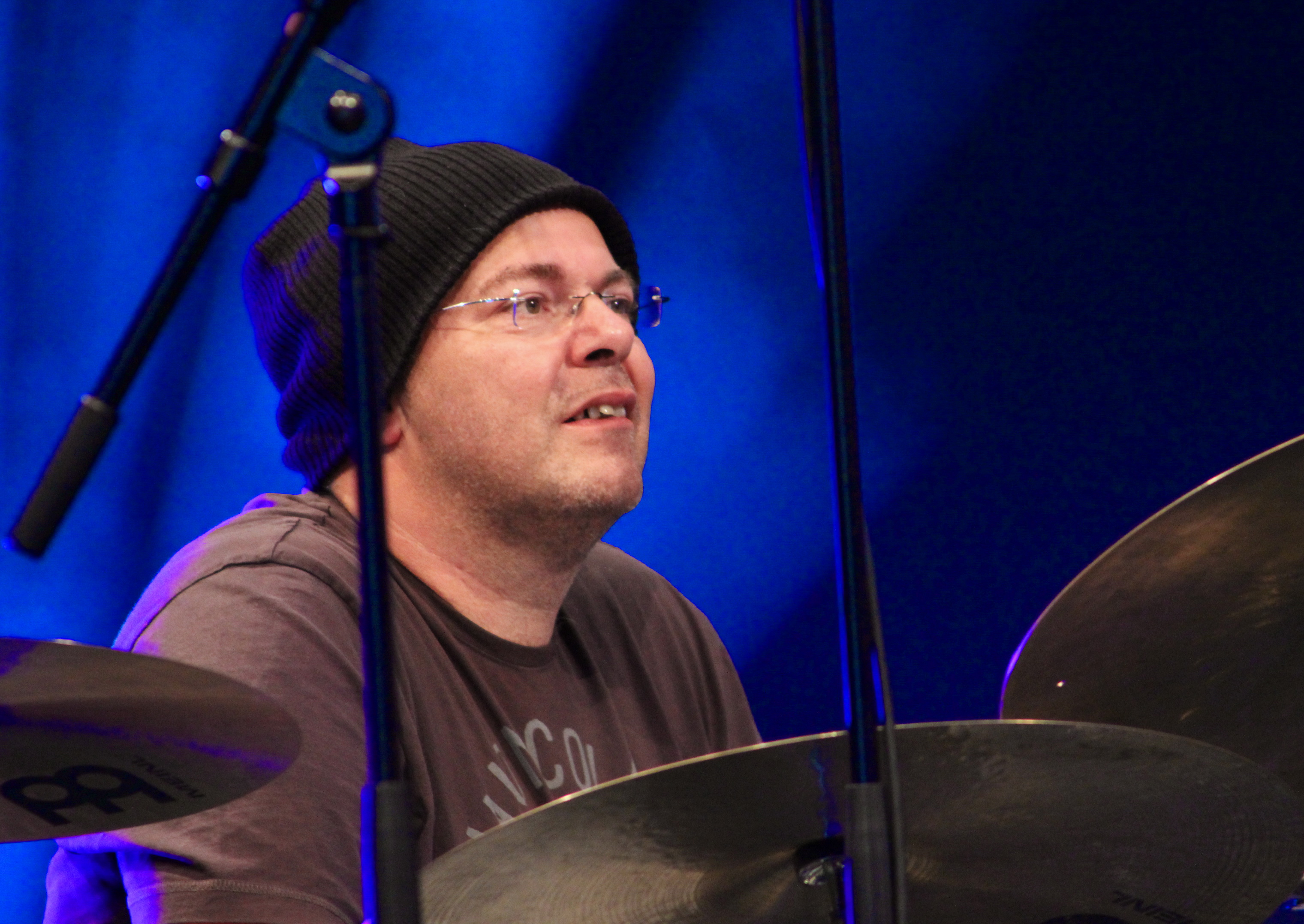 Gerwin Eisenhauer (Schlagzeuger) beim Auftritt von Trio ELF anlässlich des fünfjährigen Bestehens der BMW-Welt.